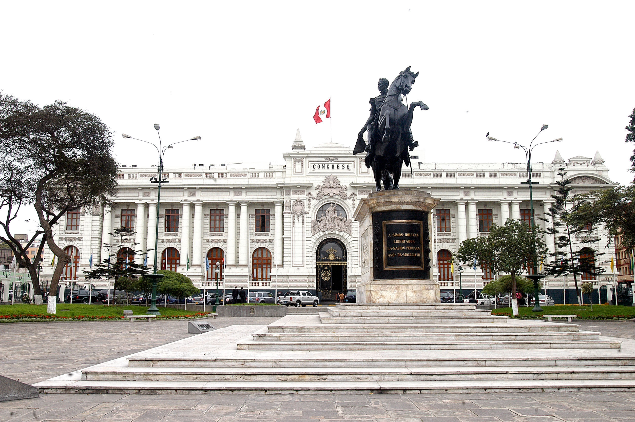 Los ministros de Justicia, Juan Jiménez Mayor, y de Trabajo, José Villena, asistirán hoy martes 6 a las comisiones de Justicia y la de Descentralización. La primera se reunirá a las 14:30 horas (Hemiciclo ‘Raúl Porras Barrenechea’) y la segunda a las 16:30 horas (Sala N°1).